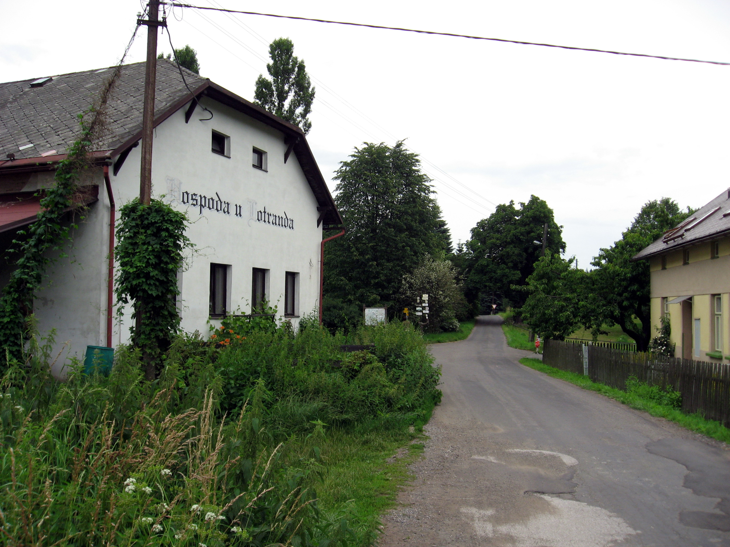 Odolov, hospoda a silnice